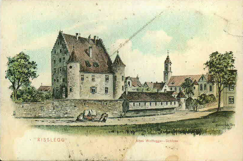 Ansichtskarte von Eugen Felle; Technoseum (Landesmuseum für Technik und Arbeit Mannheim)Motiv: Kißlegg, Altes Schloss